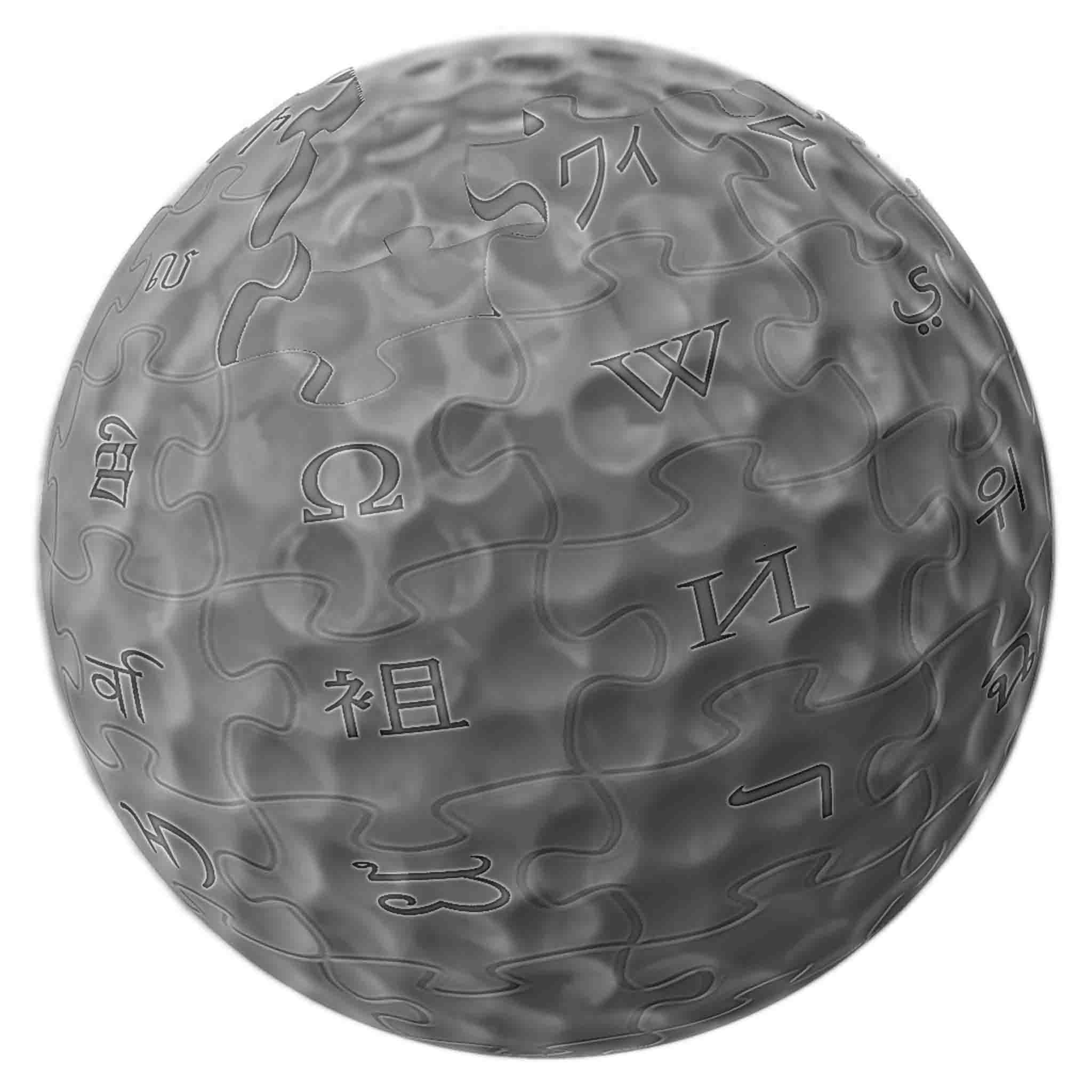 Golfball als Hybridbild-Montage